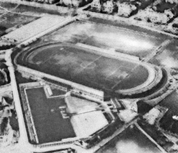 Bremen-Östliche Vorstadt / im Jahr 1928:In Bildmitte: Die „ABTS-Kampfbahn“ (ab 1930 „Weserstadion“ genannt, während der NS-Zeit „Bremer Kampfbahn“).Unten links: Das Stadionbad (damals mit 100-Meter-Becken).